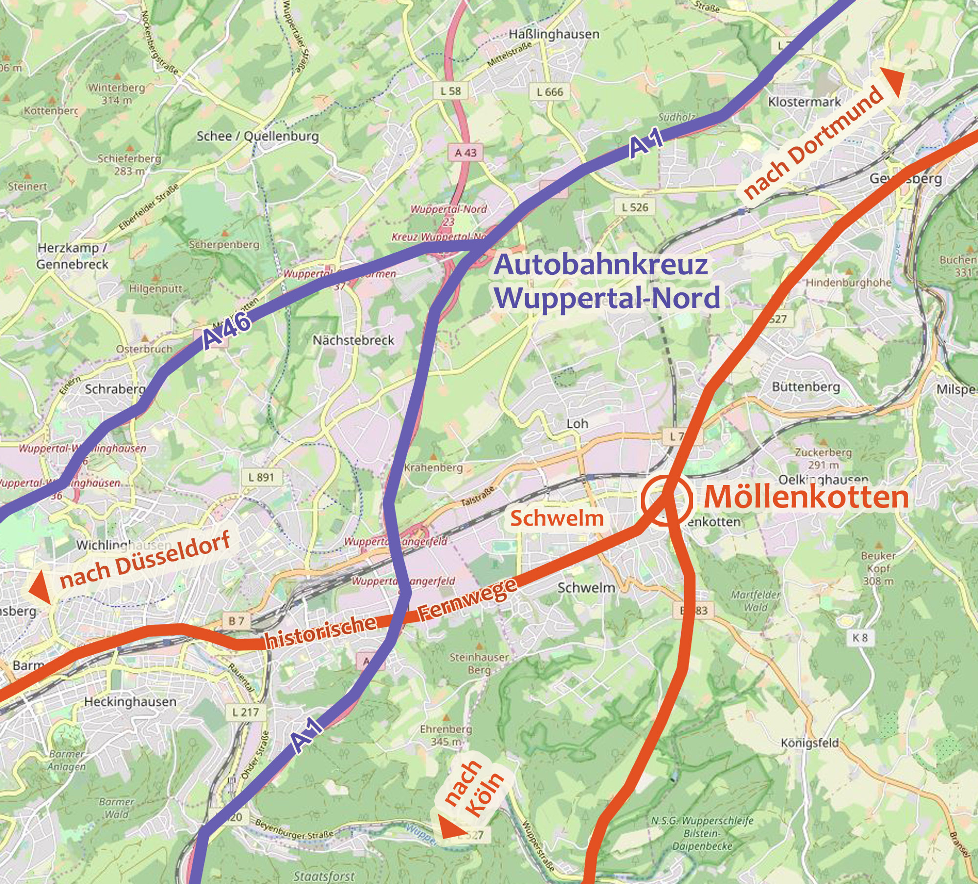 Lage des historischen Orts Möllenkotten (heute zu Schwelm gehörig) an der Kreuzung zweier bedeutender alter Heer- und Handelsstraßen zwischen Köln, Düsseldorf und Dortmund (Verlauf rot markiert). Die heutigen Autobahnen A1 und A 46 mit dem Autobahnkreuz Wuppertal-Nord (blau) spiegeln das alte Wegesystem. - Kartenvorlage aus OpenStreetMap wurde vom Hochladenden um farbige Markierungen und Text ergänzt.